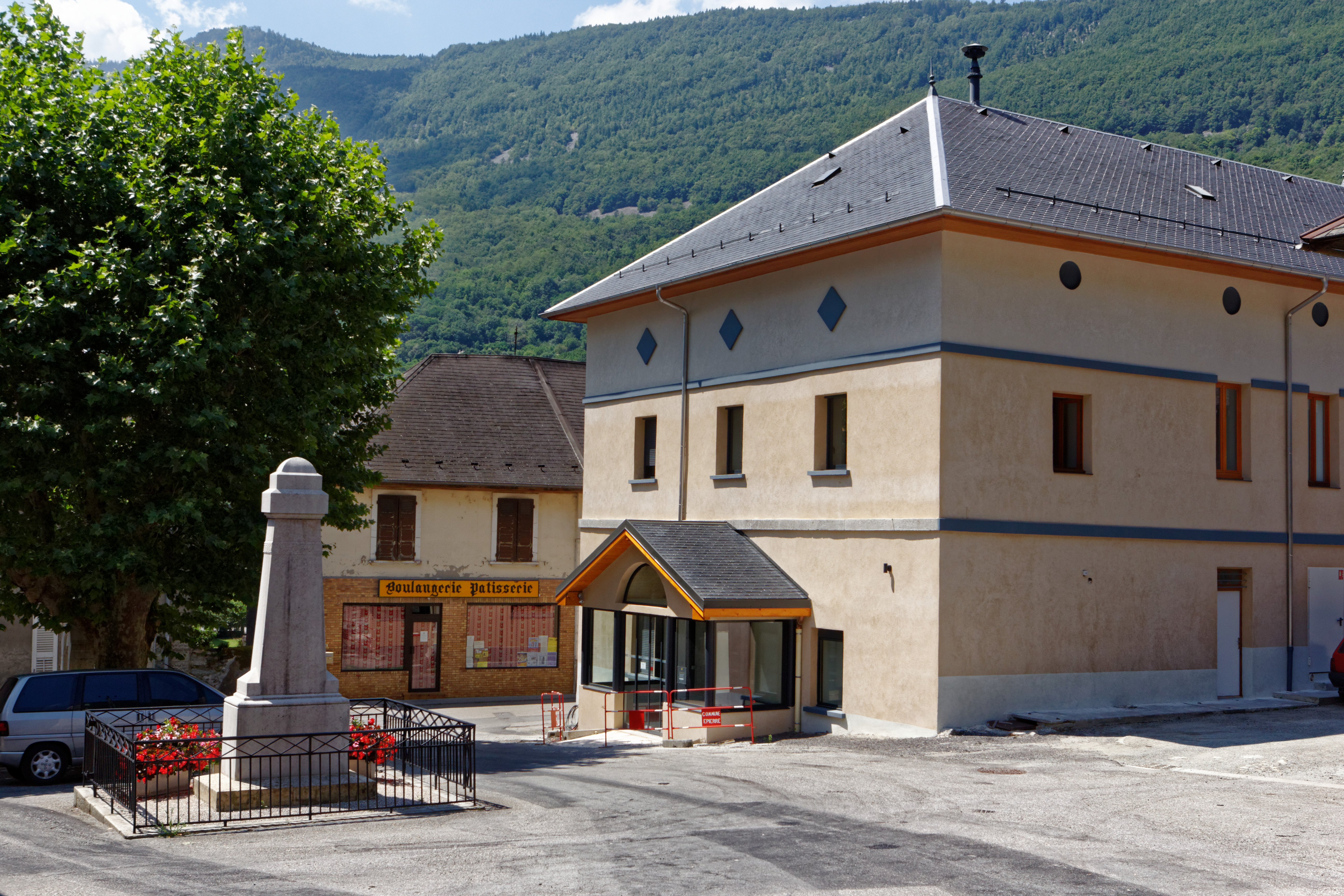 La mairie d'Épierre / Épierre / Savoie / France